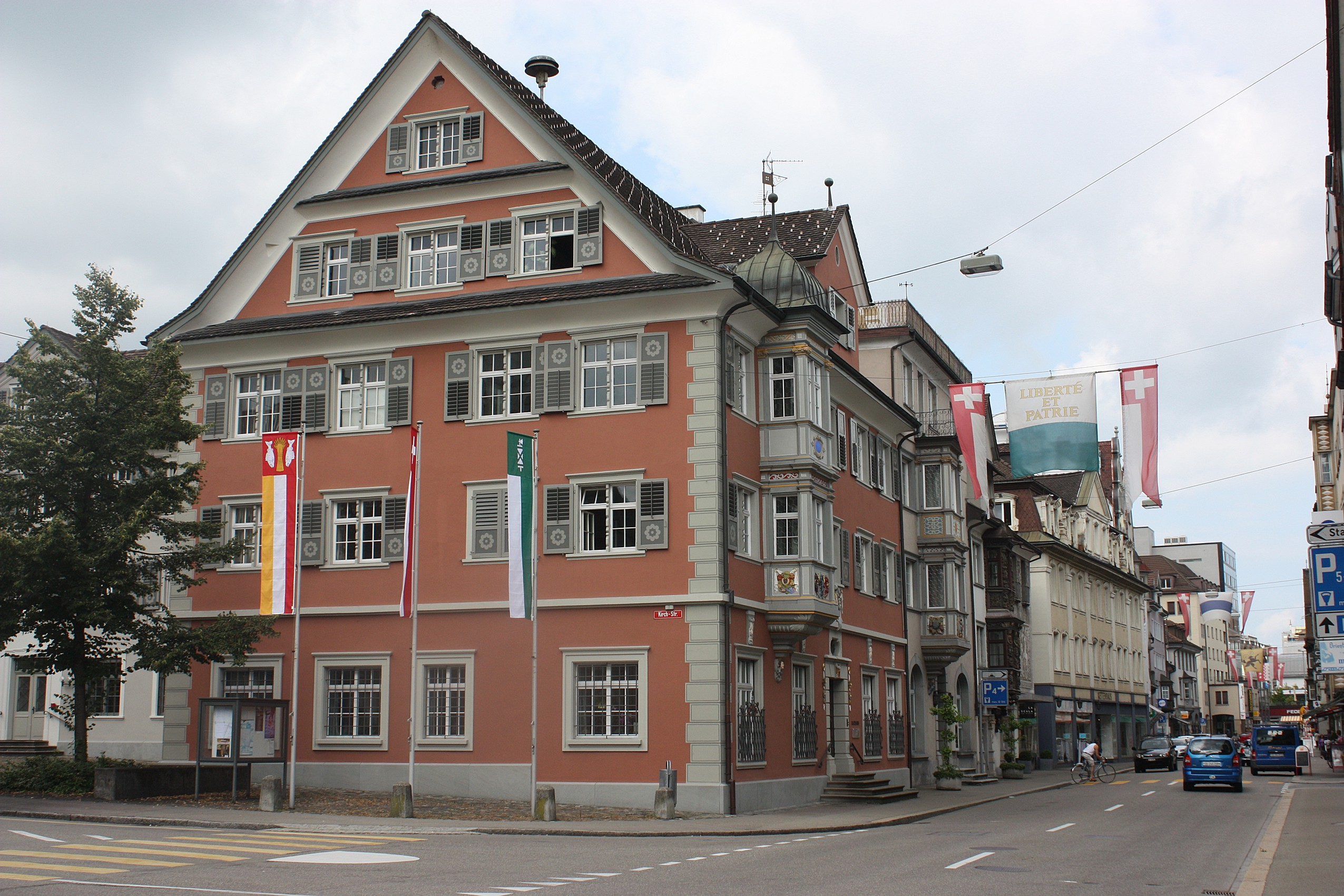 Der Sitz der Gemeindeverwaltung